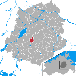 Kentzlin, Landkreis Demmin, Mecklenburg-Vorpommern